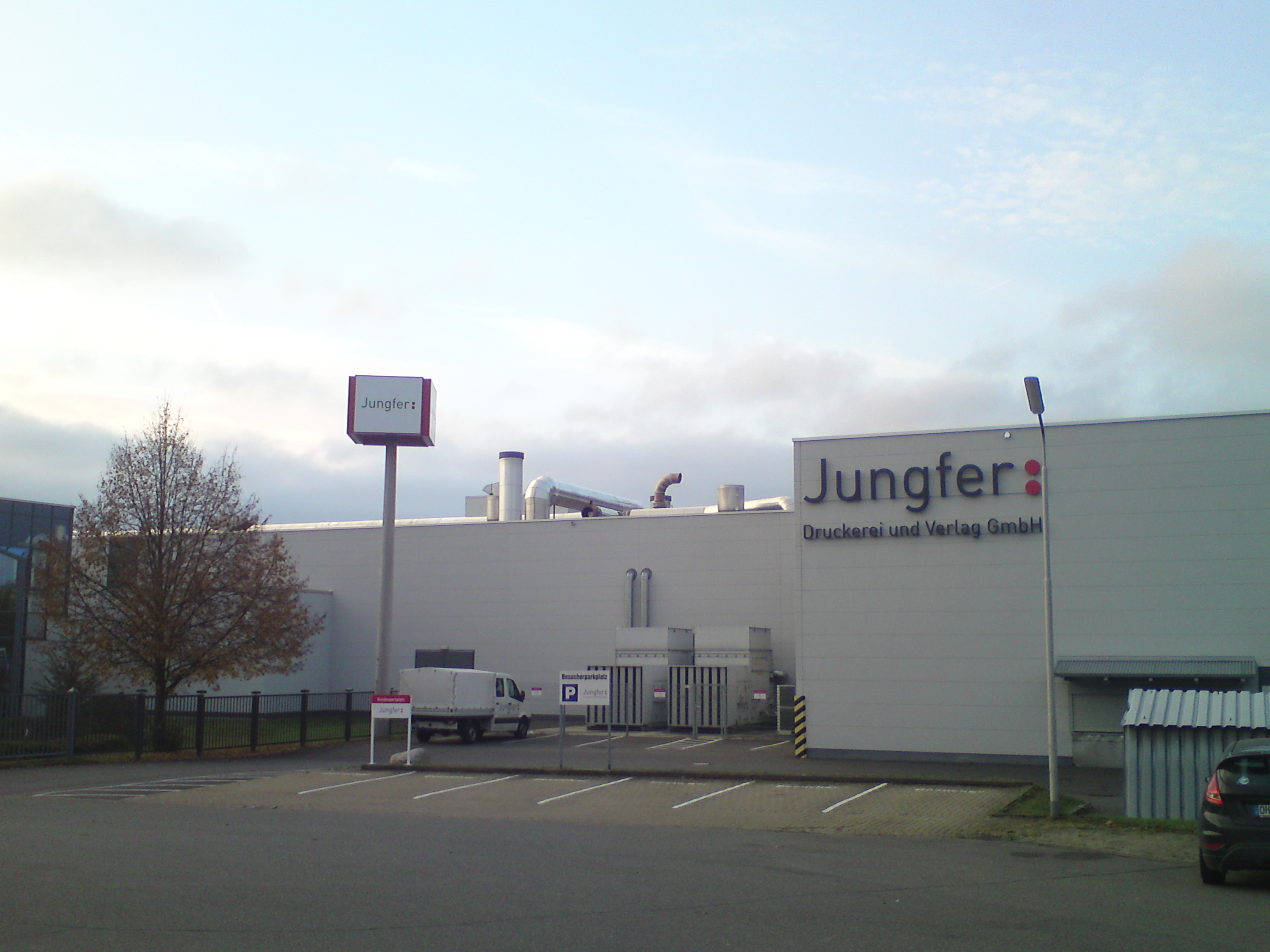 Dritte Druckerei der Jungfer Group (auch: Junger Druckerei und Verlag GmbH) in der Gutenbergstraße von 1989 bis heute.